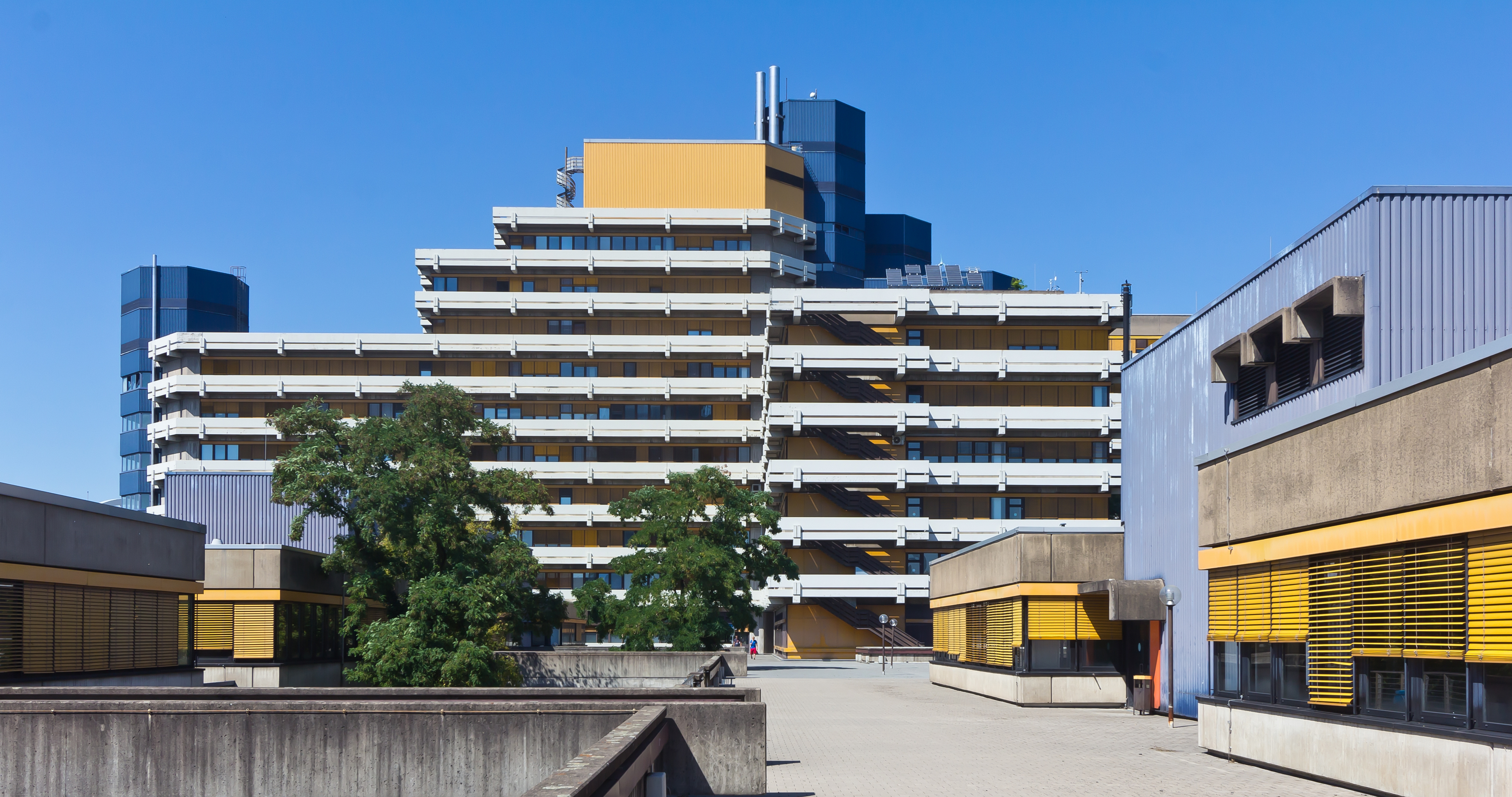 Fachhochschule Köln - Ingenieurwissenschaftliches Zentrum (IWZ)